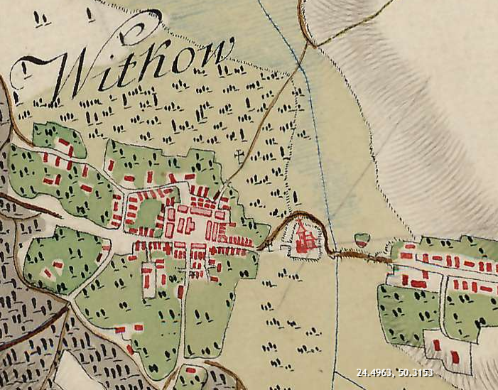 колись ідеальне місто вітків